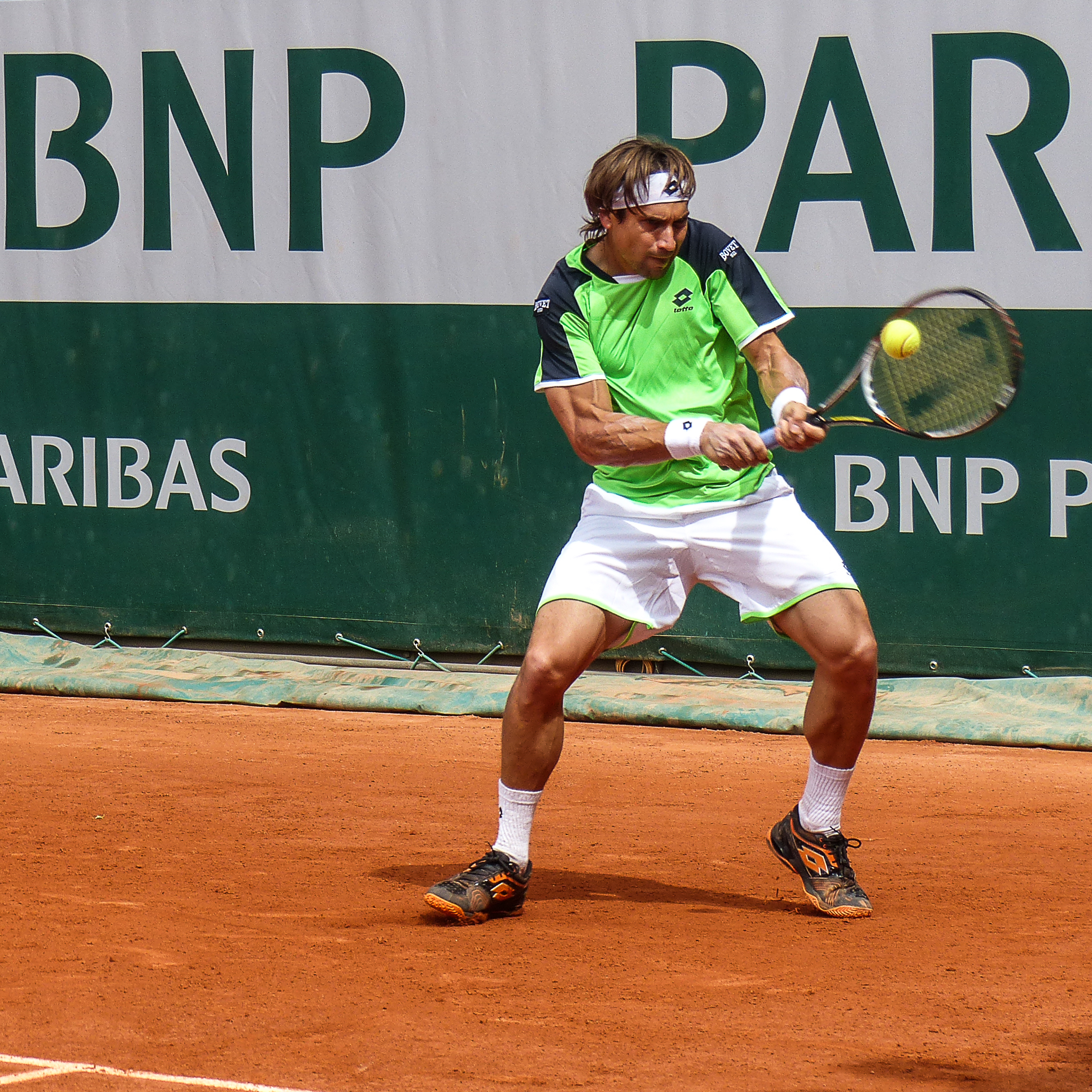 2ème tour Roland Garros 2013 : David Ferrer (ESP) def. Albert Montanes (ESP)